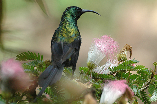 Uganda Bronze Sunbird (Nectarinia kilimensis)